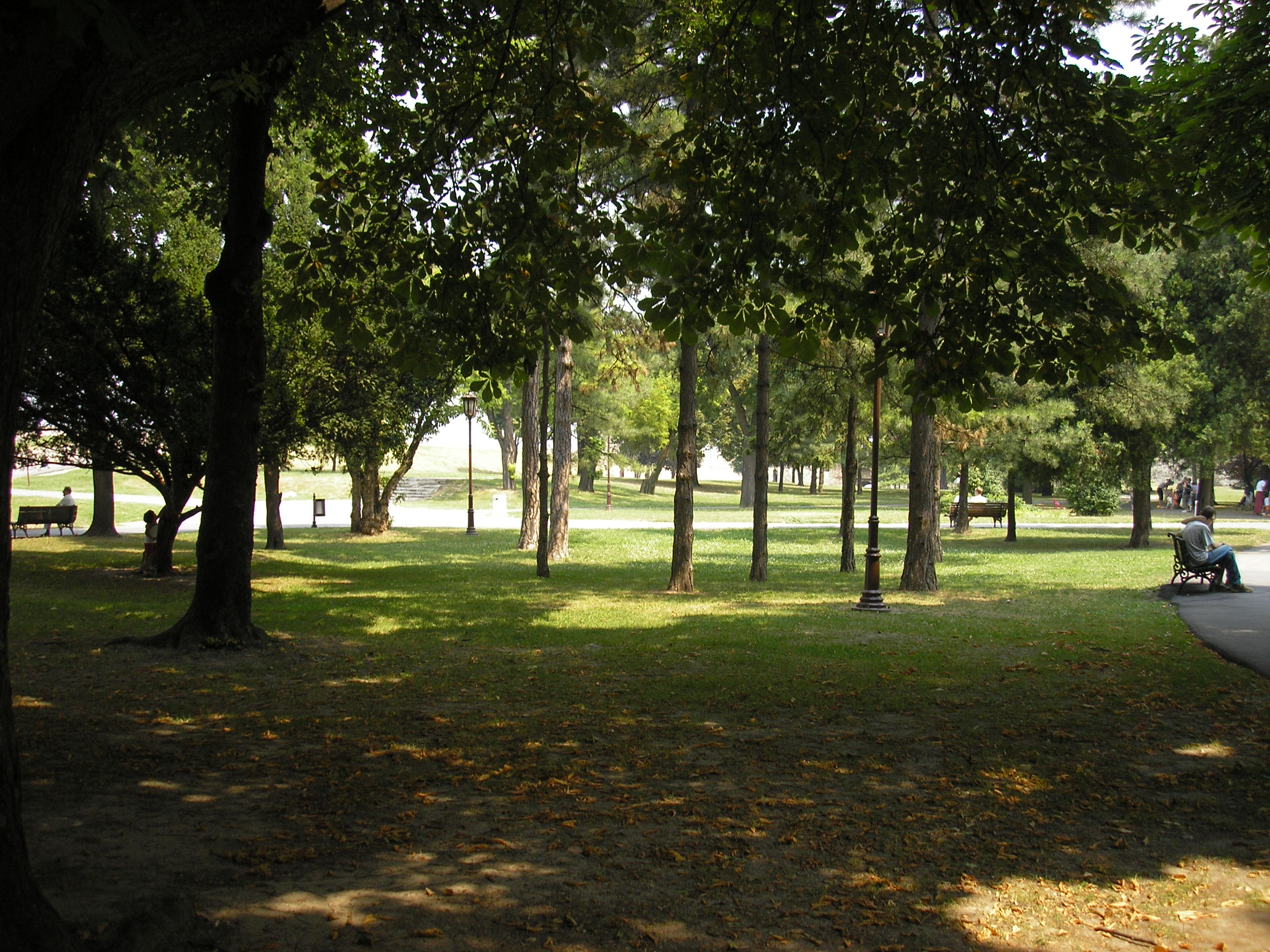 Категорија:Знаменитости Београда